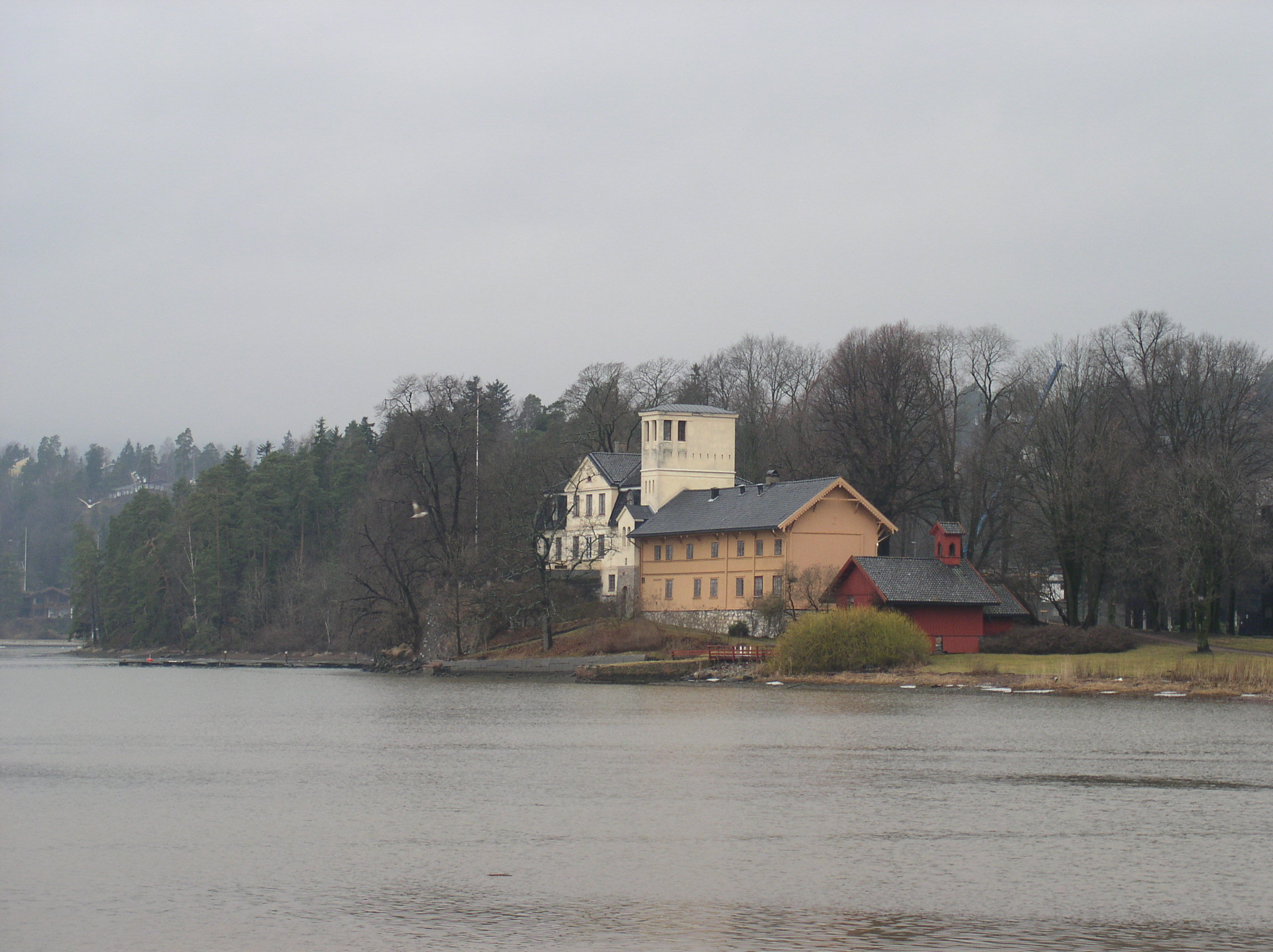 Kjørbo gård